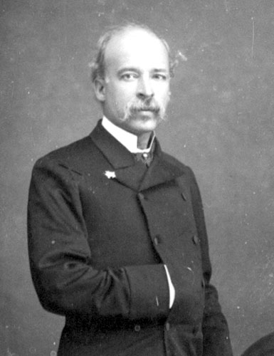 Hermenegildo Carlos de Brito Capelo (1841 —1917), explorador português do continente africano.